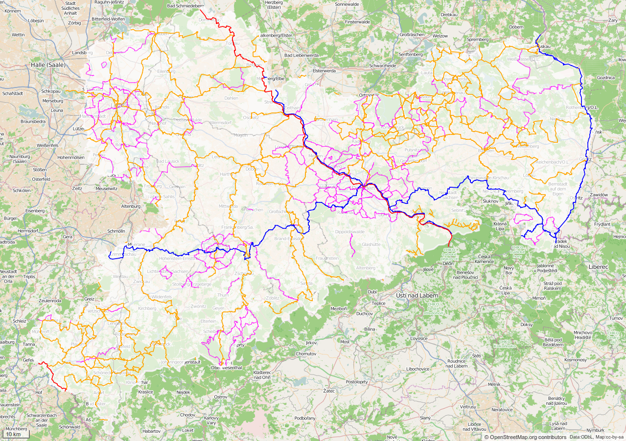 Visualisierung der in OpenStreetMap angelegten Radrouten für das Bundesland. Erstellt durch cmuelle8's Abfrage auf overpass-turbo.eu. Farbkodierung rot/red europäische und internationale Radrouten blau/blue nationale Radrouten des D-Netz orange regionale und überregionale Radrouten pink/magenta lokale und regionale Radrouten